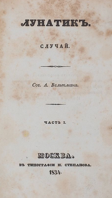 Lunatik A. F. Veltmana